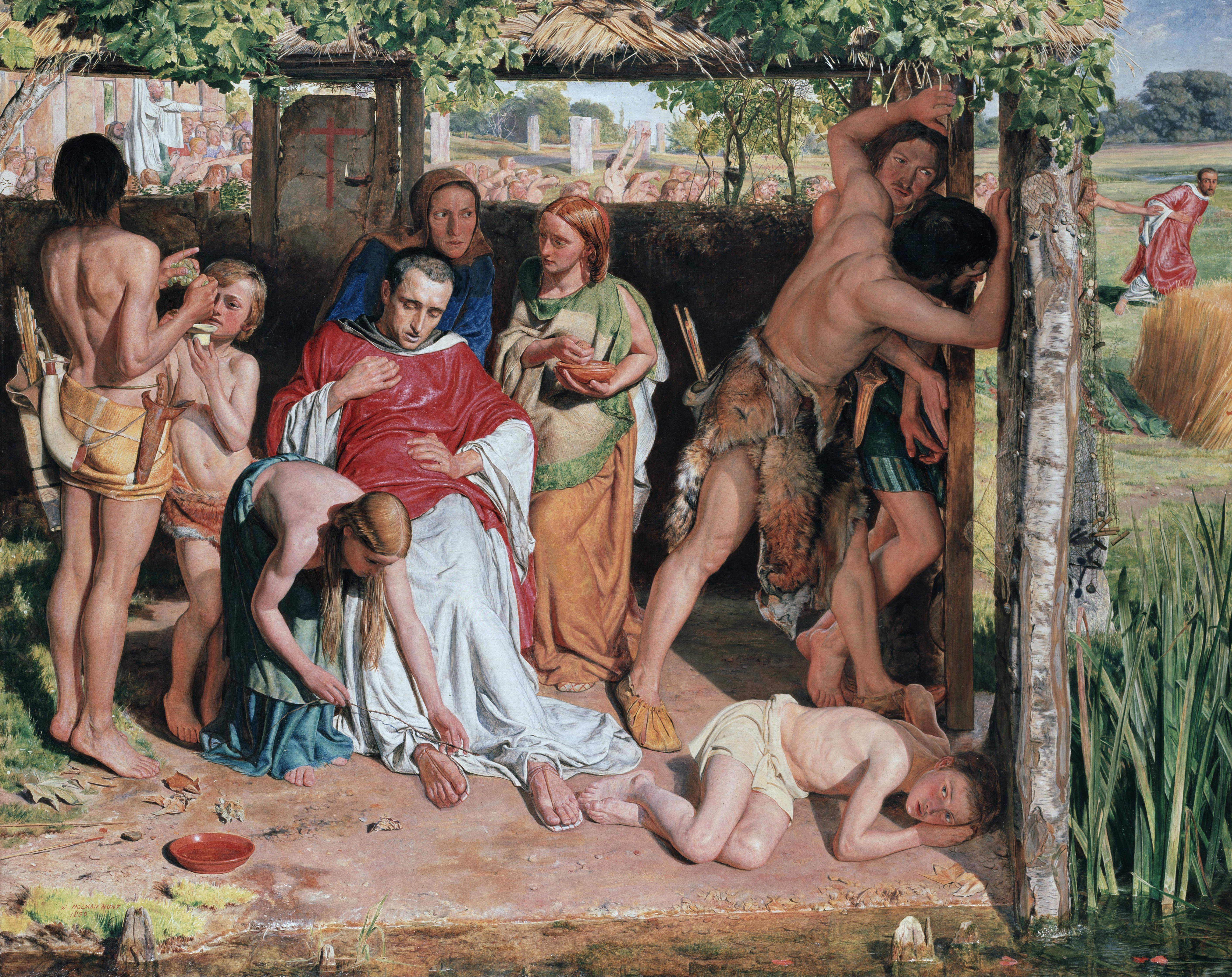 Английское семейство, обращённое в христианство, защищает проповедника этой религии от преследования друидов